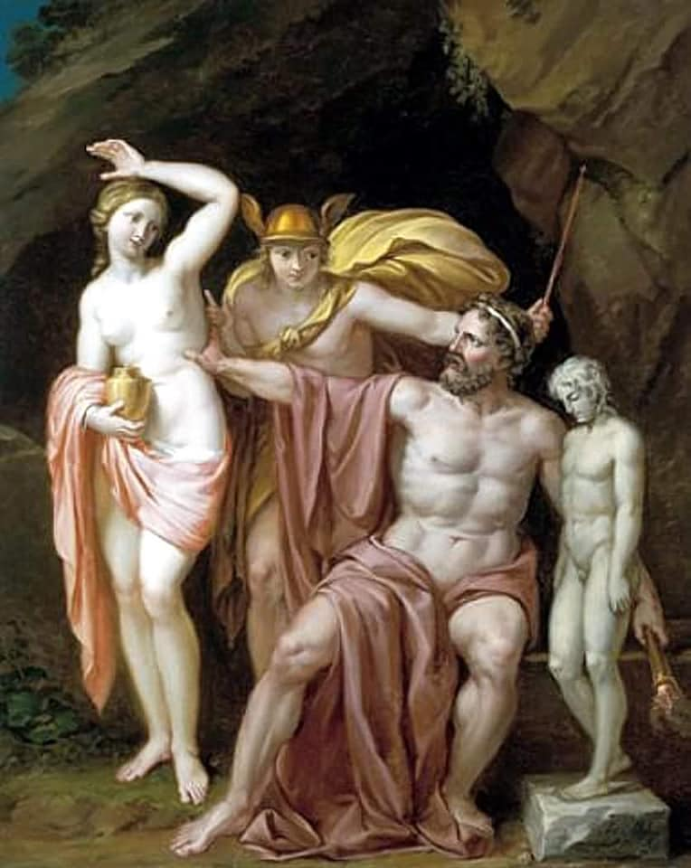 Prometheus, Merkur und die Pandora